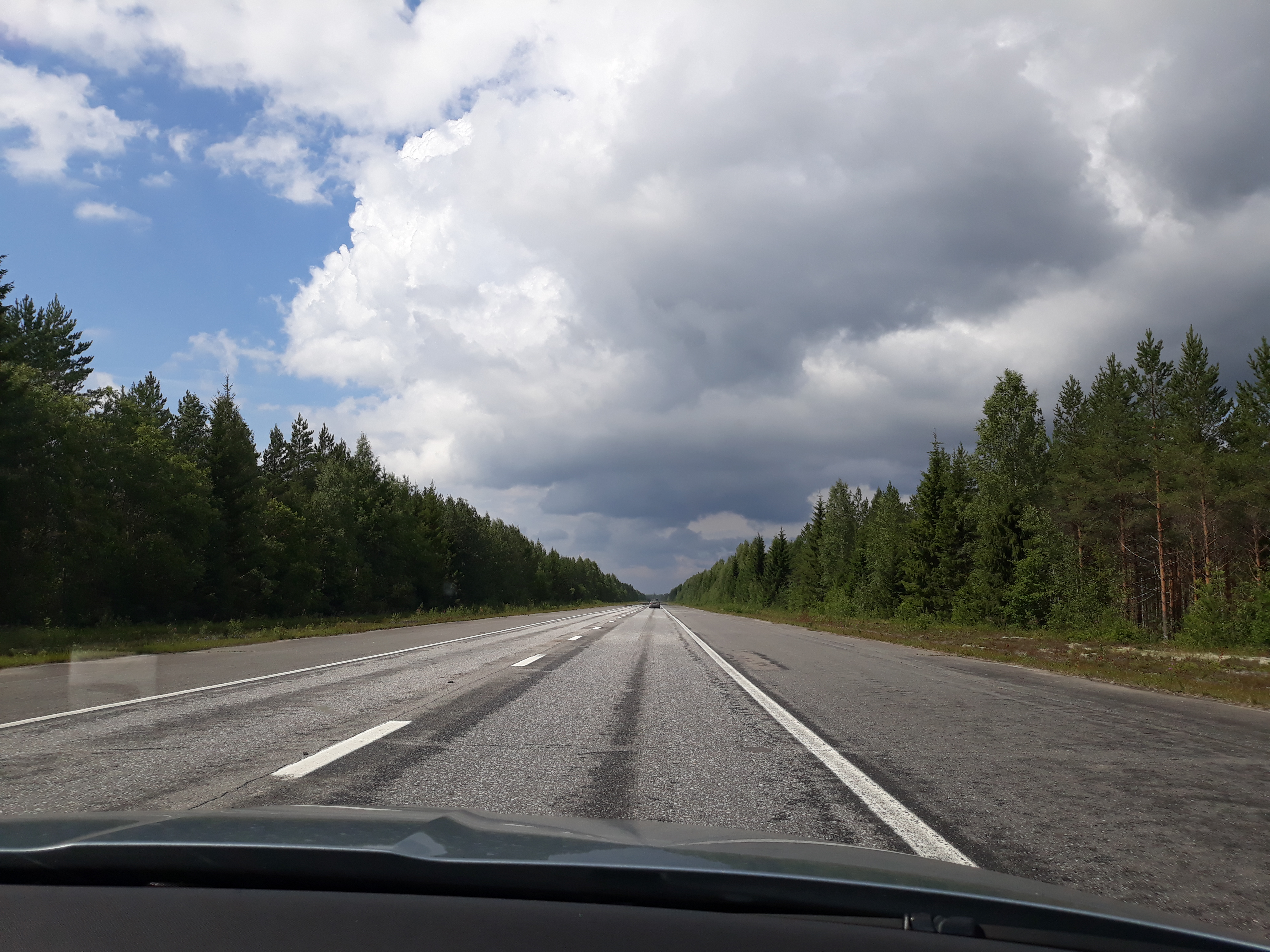 Tervon varalaskupaikka Tervossa seututiellä 551.